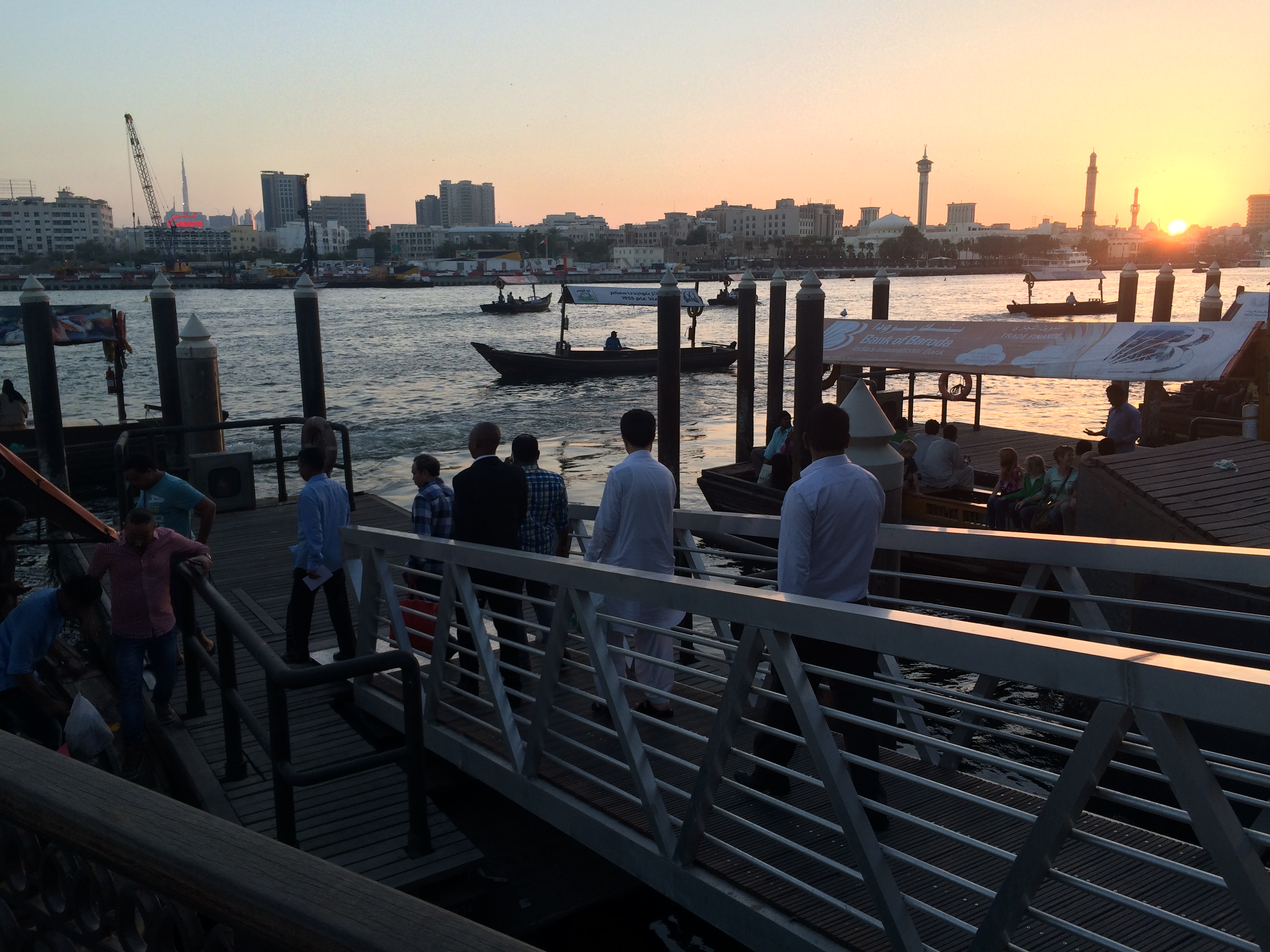 Deira, Dubai.